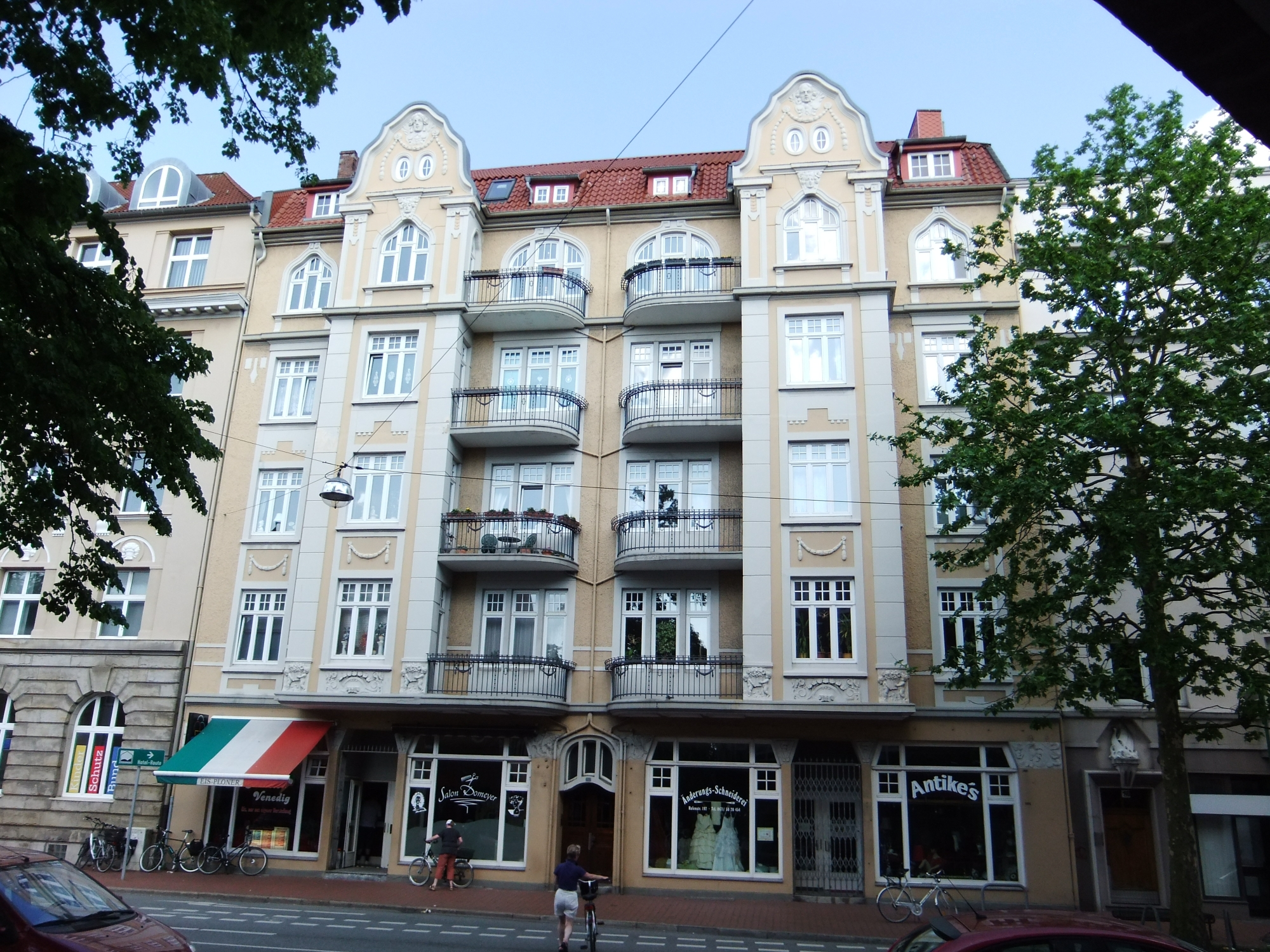 Wohnhaus in Bremerhaven, Hafenstraße 192. Das abgebildete Objekt ist ein geschütztes Kulturdenkmal in der Freien Hansestadt Bremen, mit der Nr. 1573 beim Landesamt für Denkmalpflege registriert.